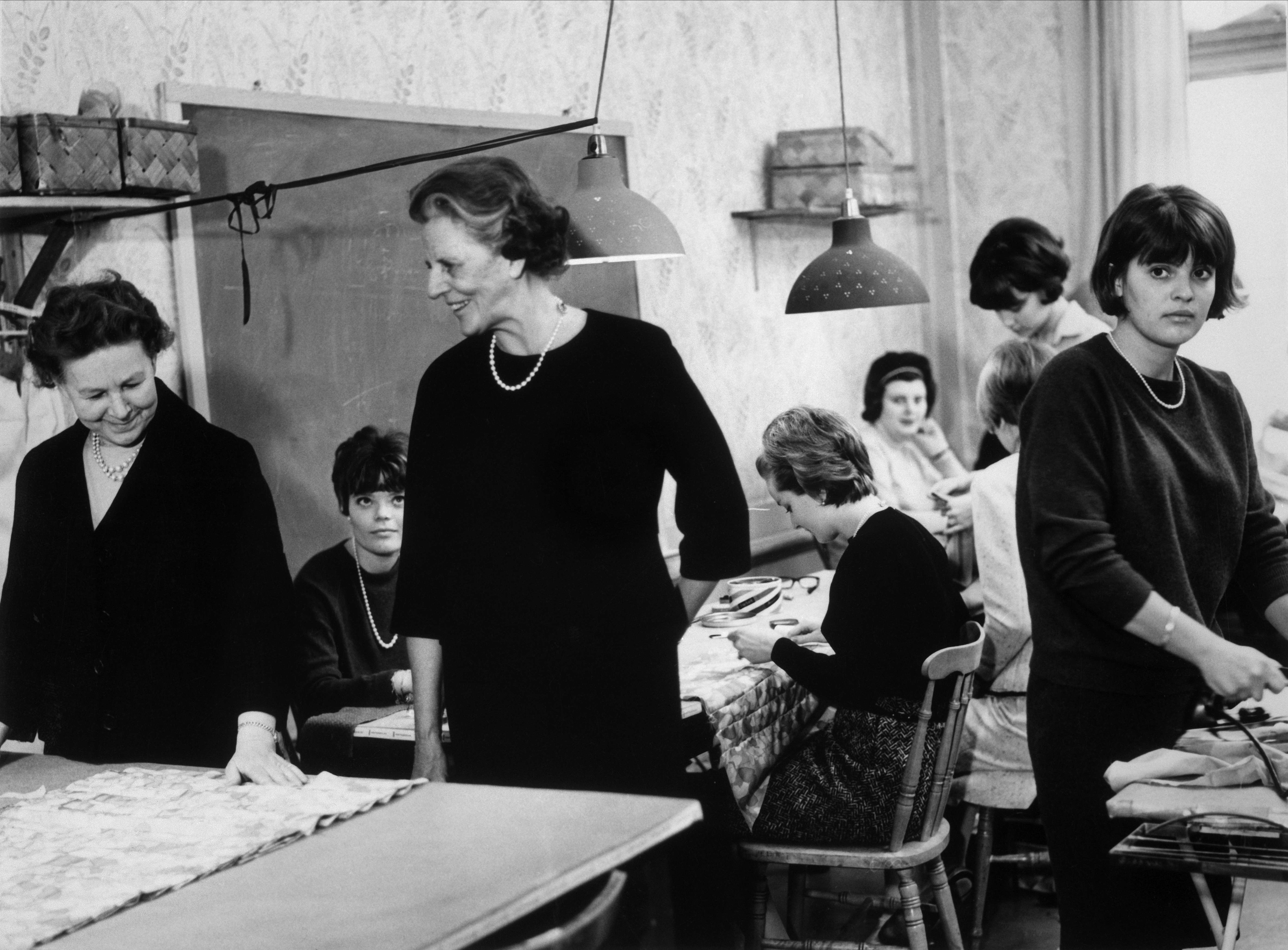 Märthaskolan, Stockholm, Sverige ca 1960. Grundaren och föreståndaren Marg von Schwerin med elever.